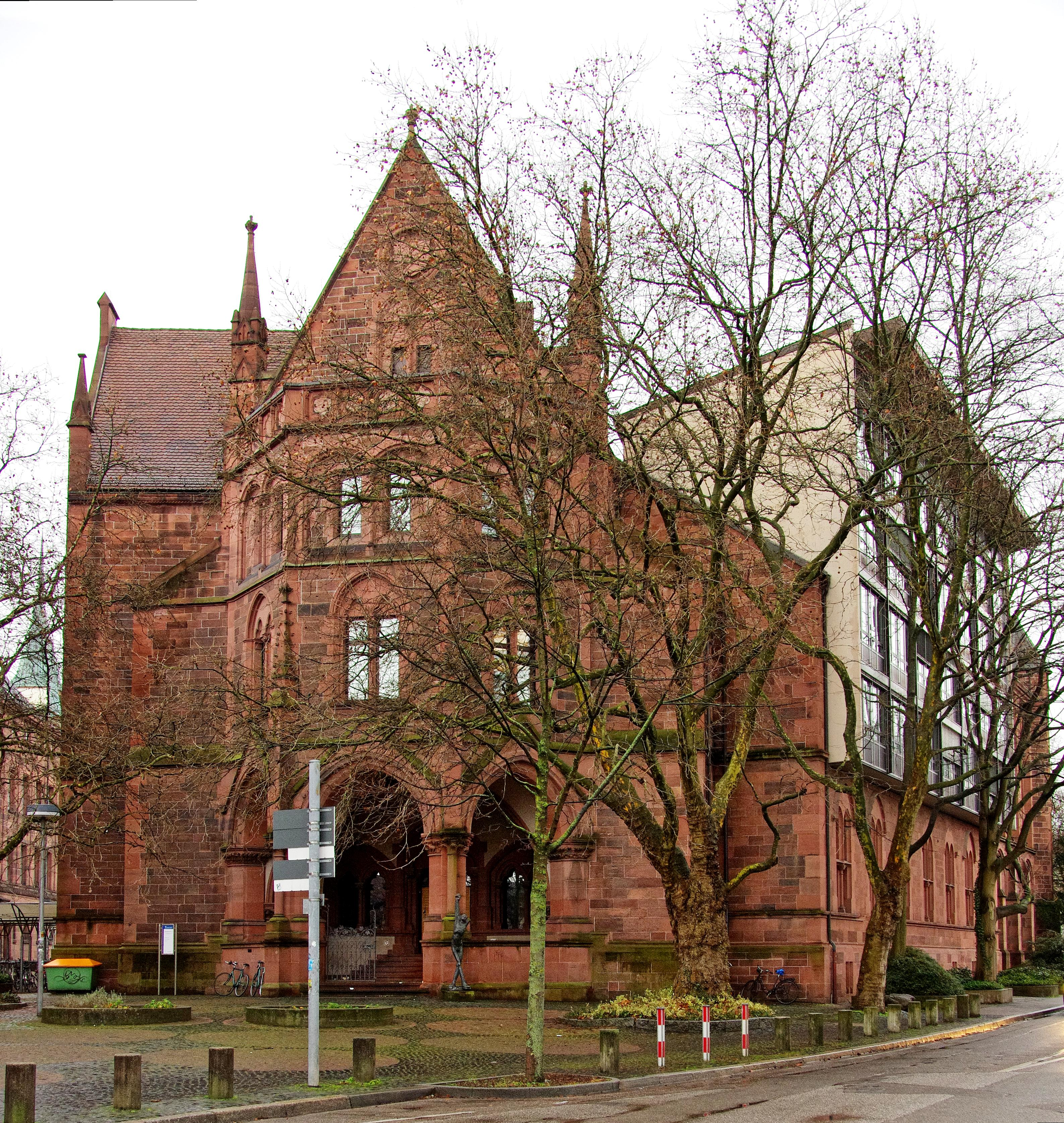 Das KG IV der Uni Freiburg